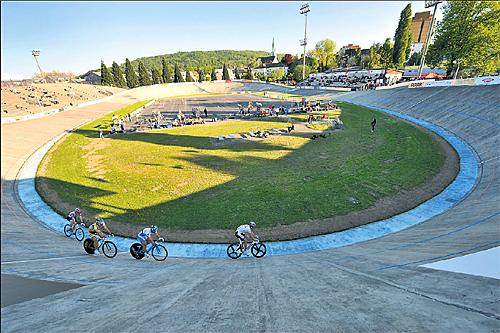 Offene Rennbahn Zürich-Oerlikon